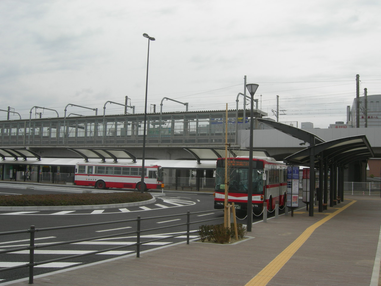 JR長町駅東口バスプール（JR Nagamachi stn. east buspool）